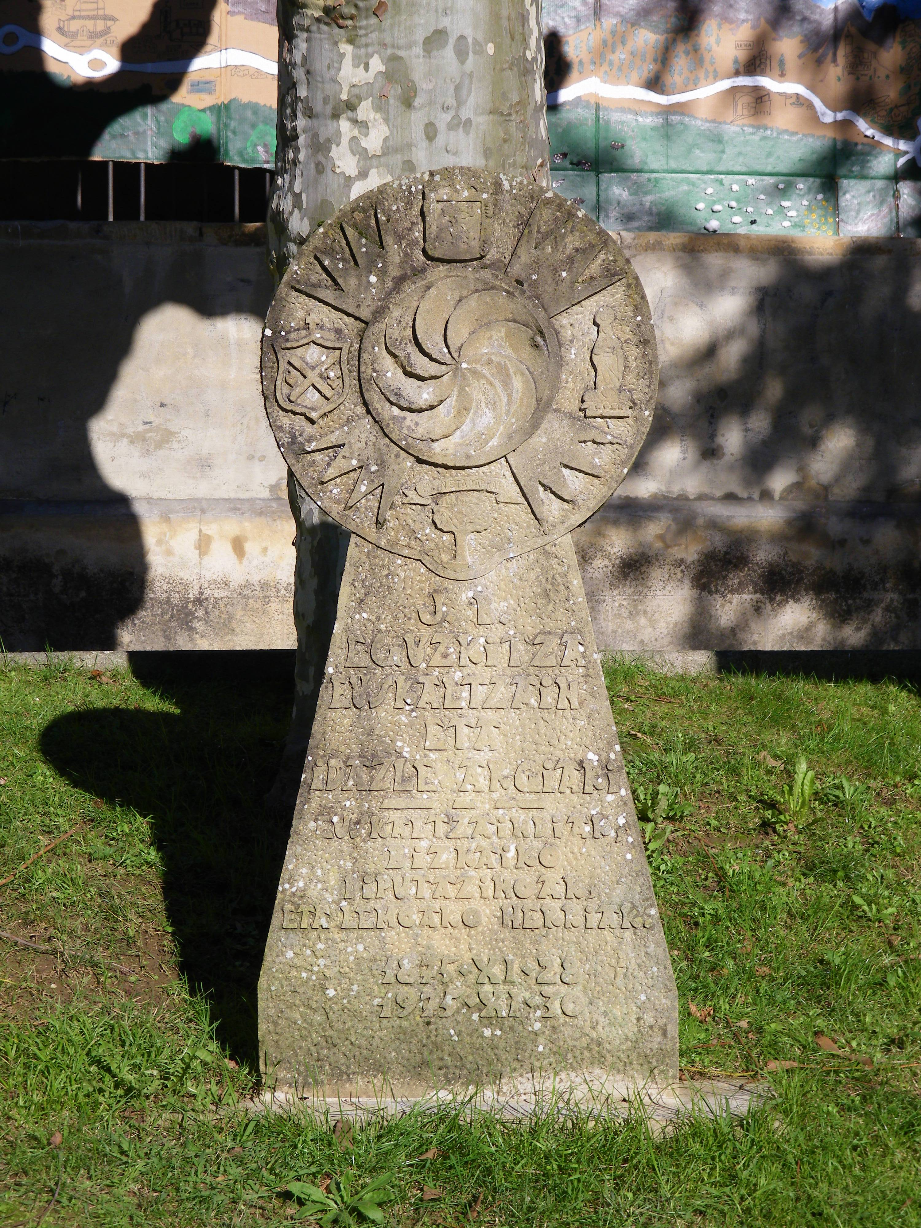 Juan Bautista Eguzkitza Meaberen omenezko hilarria, Lemoan (Bizkaia) 1875an jaiotako euskal idazlea izan zen.